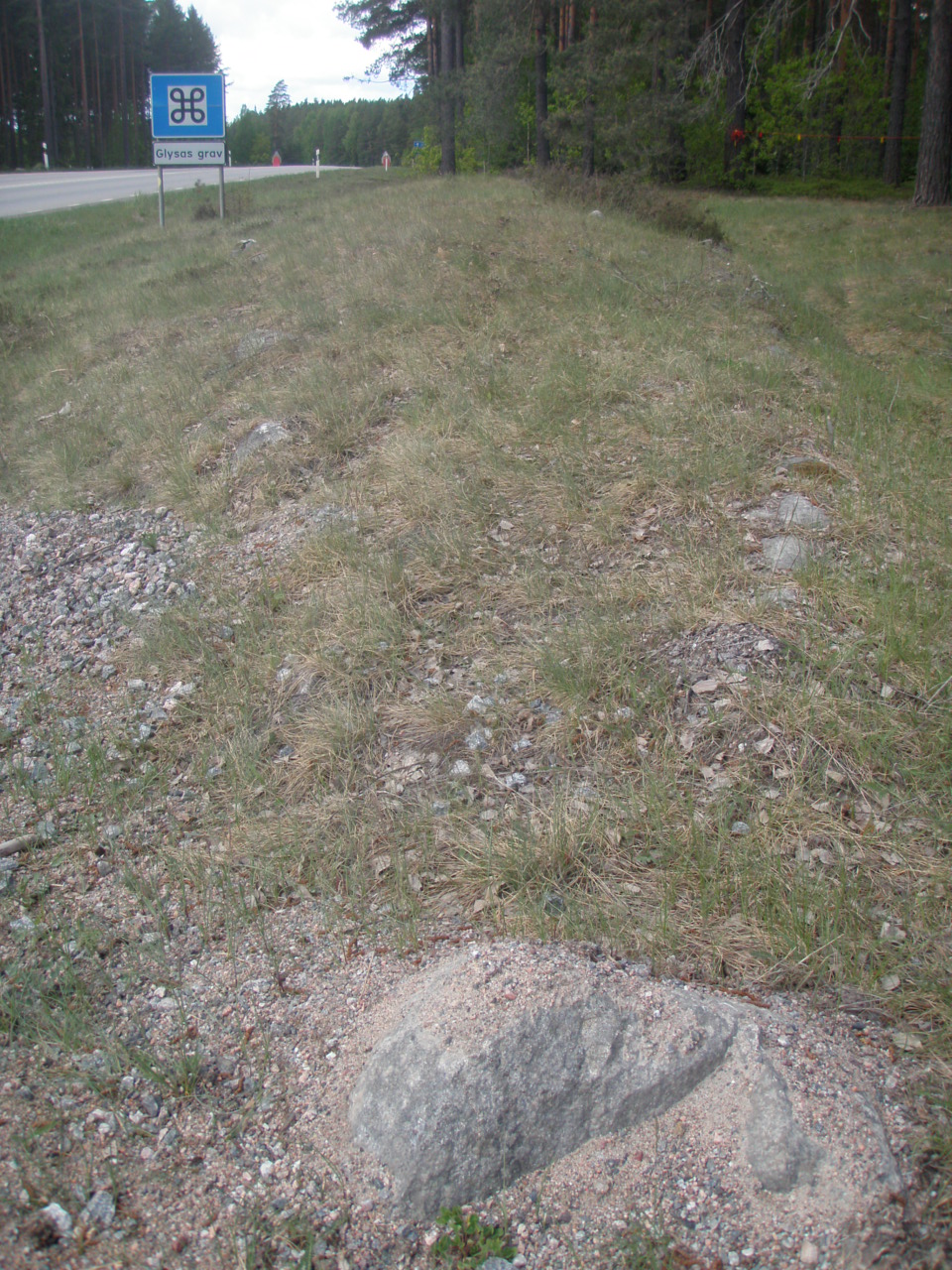 En ca 35 meter lång skeppsformig skeppssättning, som enligt traditionen ska vara en jättinnas grav. År 1935 undersöktes stensättningen under ledning av Ivar Schnell. Fynden var få. Arkeologerna hittade en stenyxa i gravfyllningen och en gravgömma med aska i graven. När gravfynden var få blir gravens tillkomststid svår att bestämma, men man antar att den är från järnåldern och är 1000-2000 år gammal. I den södra sidan av skeppsgraven, närmast fotografen, finns en rest sten vid den tilltänkta stäven, så har fordom även funnits i den norra.